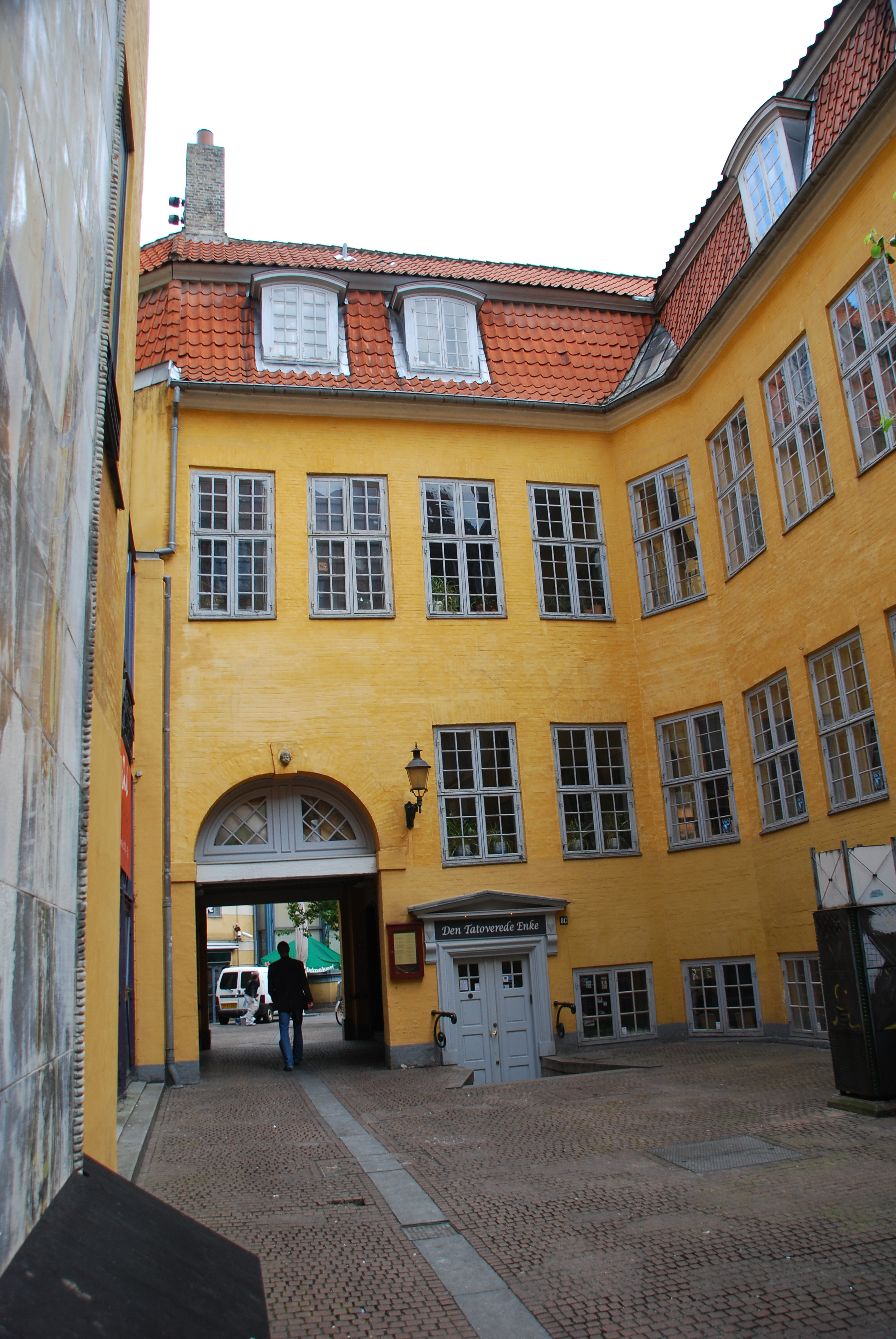 Baron Boltens Gård in central Copenhagen, Denmark